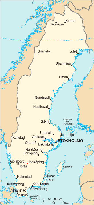 situo de la urbo Jönköping en Svedio